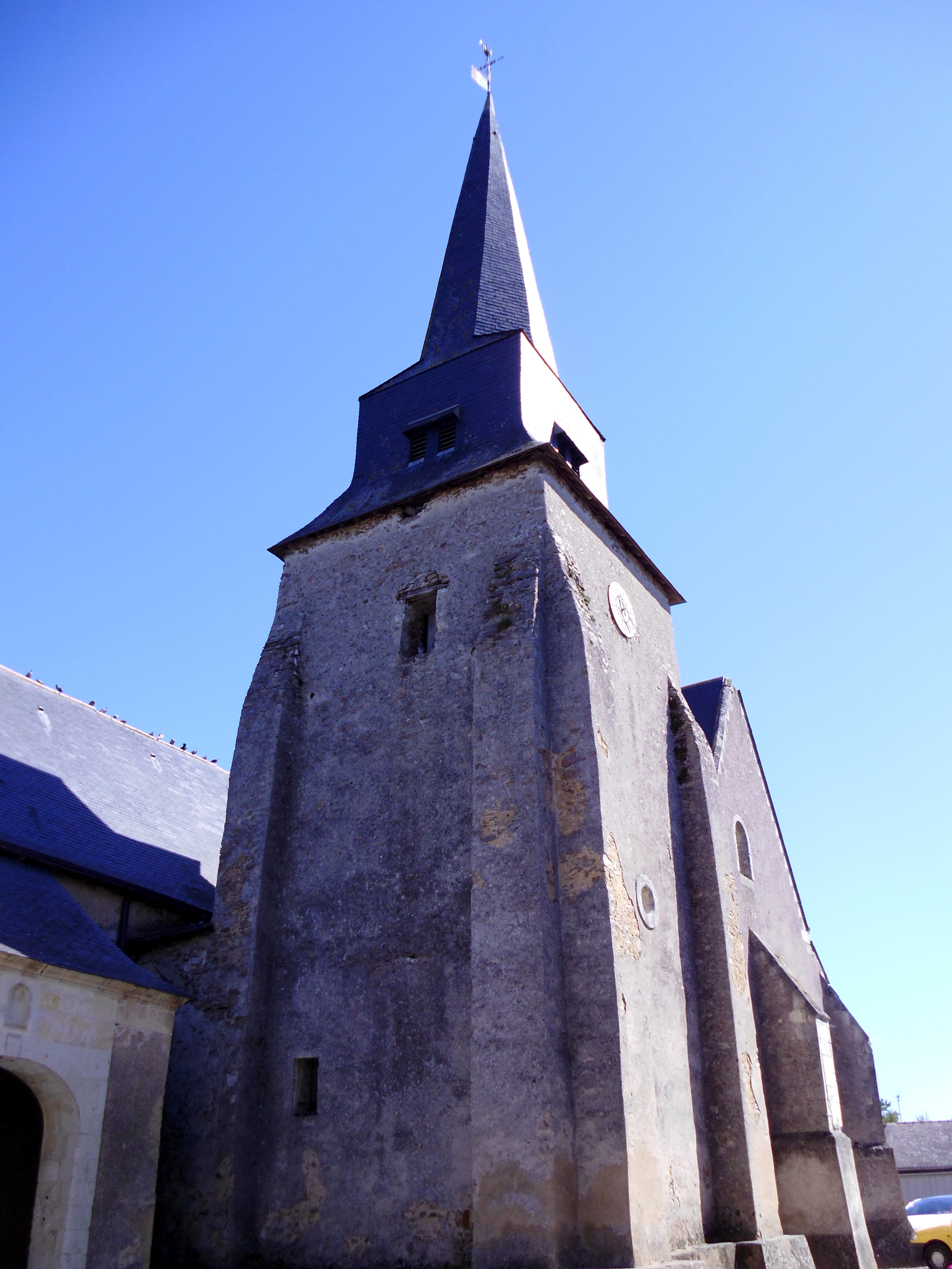 Marcé - Maine-et-Loire - France. Église Saint-Martin-de-Tours, ensemble inscrit Monument historique.